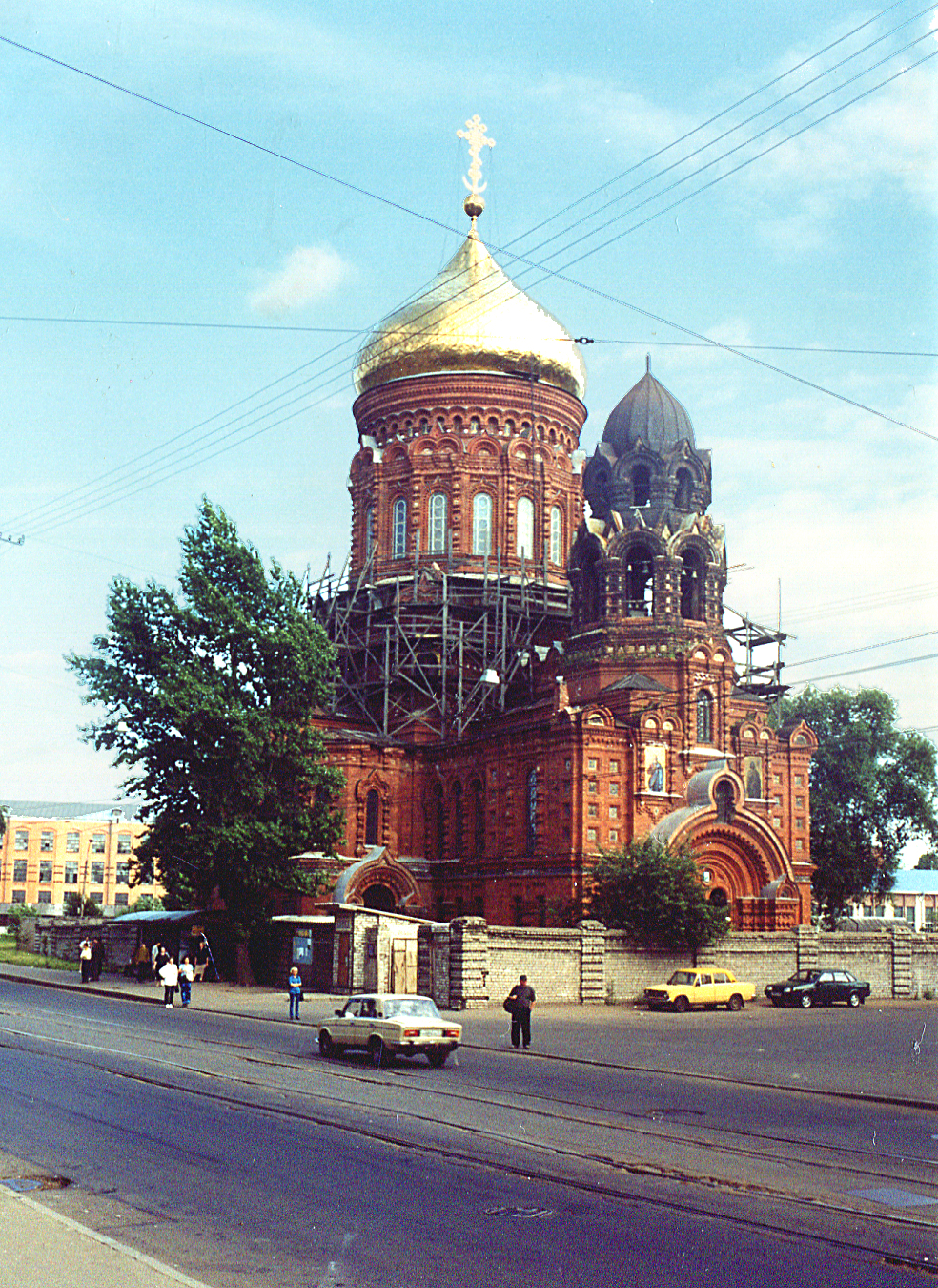 Церковь Богоявления